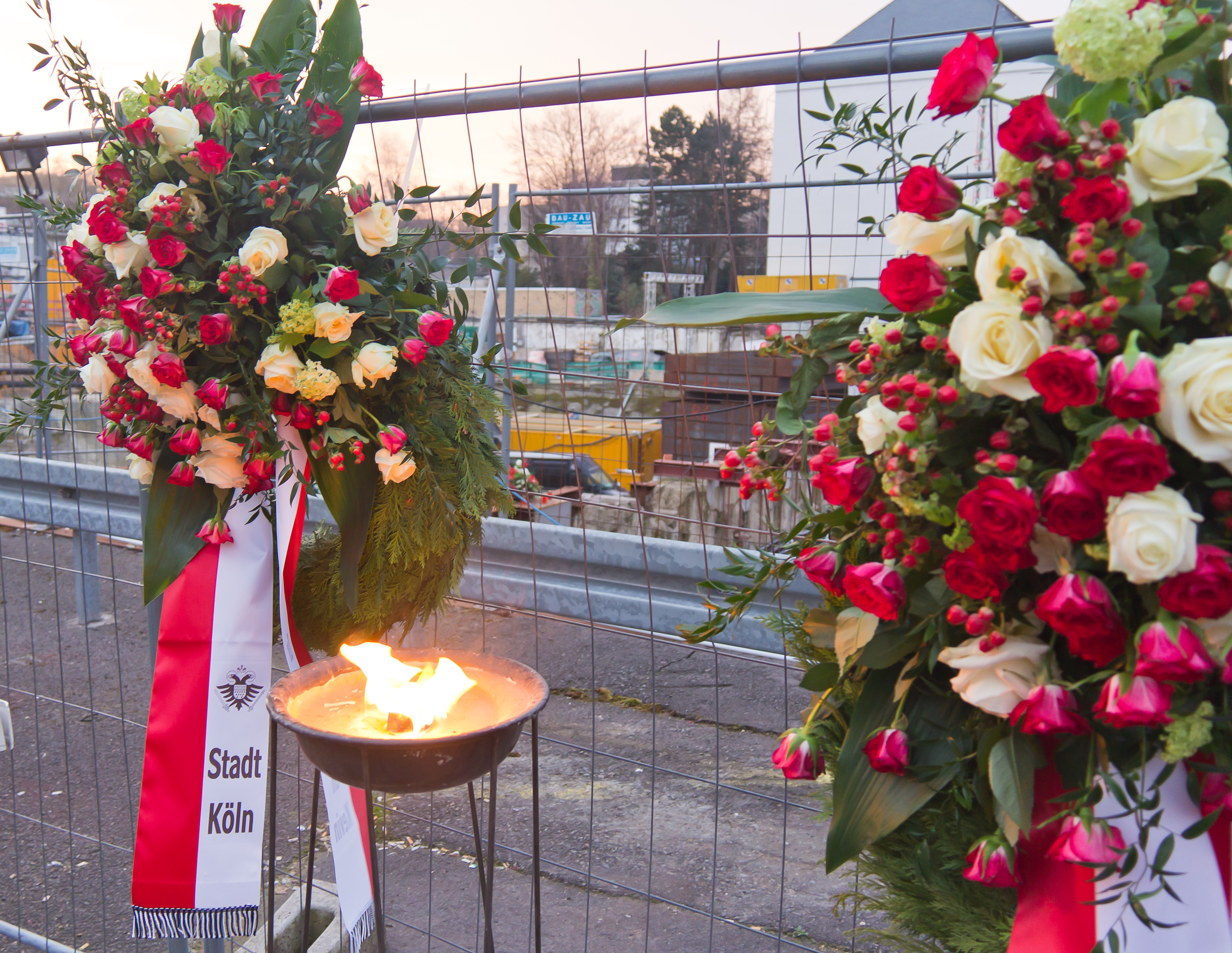 Gedenkfeier der Stadt Köln zum 5. Jahrestag des Einsturzes des Historischen Archivs Kölnn Foto: Trauerkränze der Stadt Köln zum Gedenken an die Opfer Kevin und Khalil; brennende Kerze